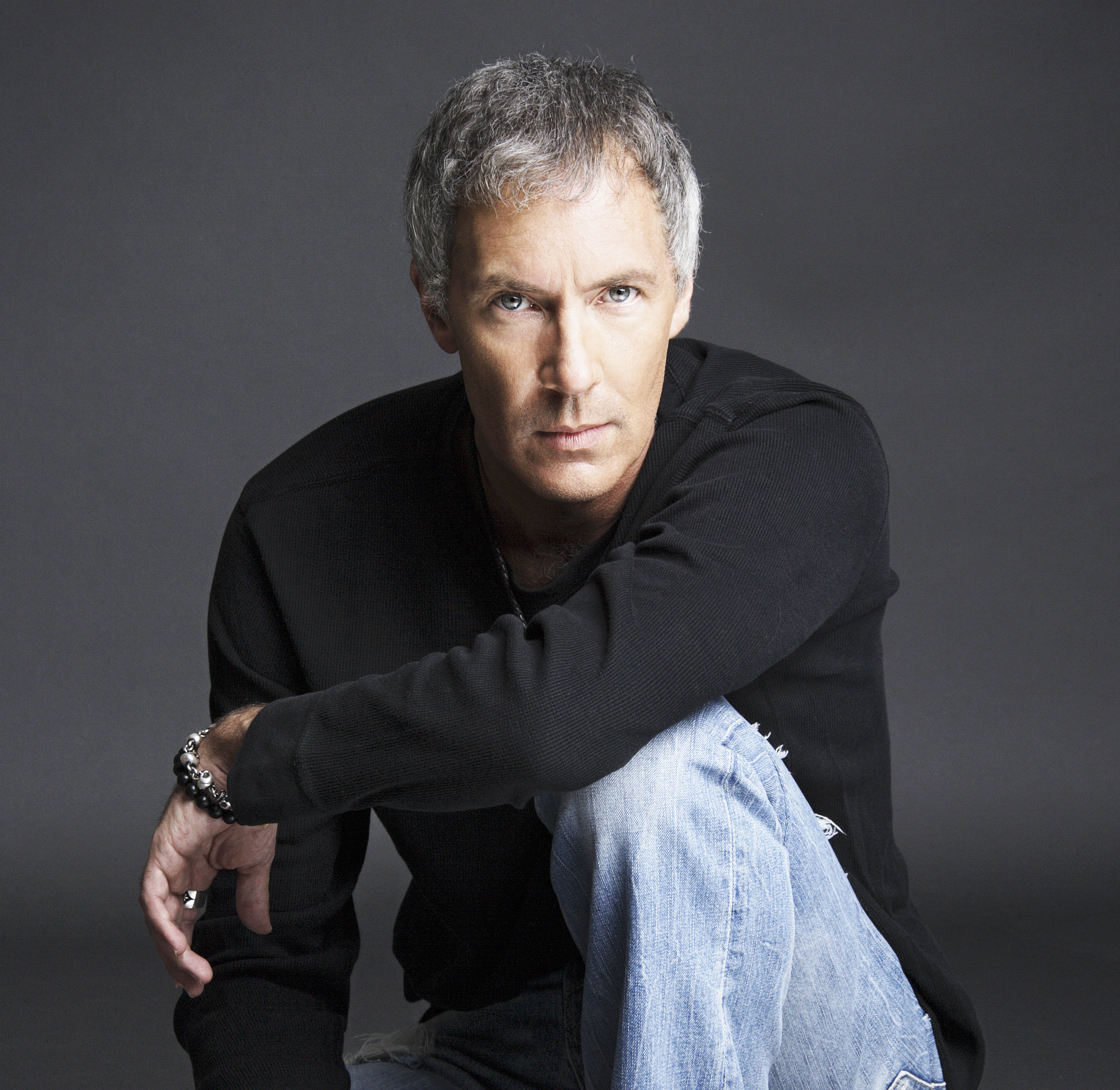 Alex García, productor de cine, televisión, teatro & música.